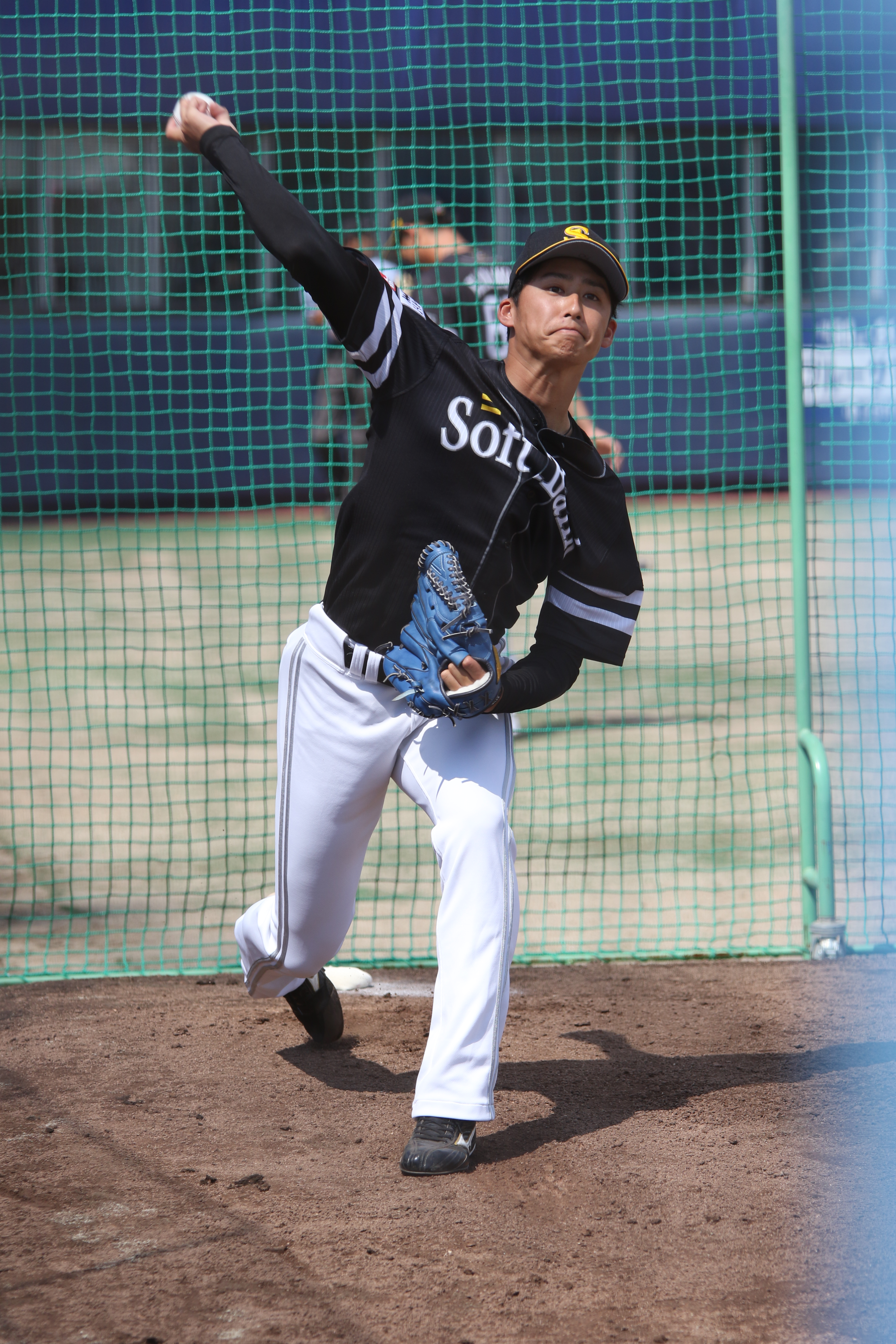 投球練習中の坂東